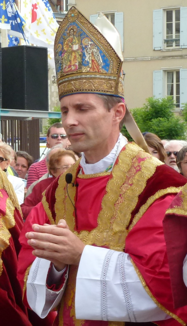 Portrait de Mgr Nicolas Brouwet. Photo prise à l'entrée de la cathédrale de Chartres à l'occasion de la messe de clôture du pèlerinage de Chrétienté en 2011.